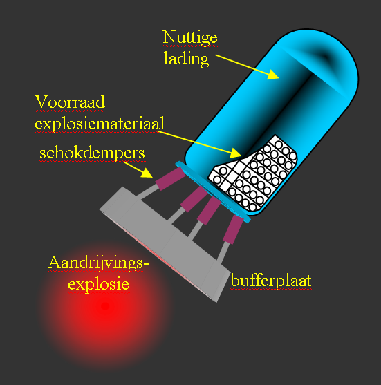 principeschets Orion raket; zelf gemaakte schets